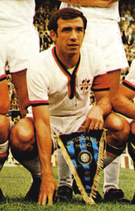 Il calciatore italiano Pierluigi Cera al Cagliari, in un'amichevole del precampionato 1969-70 allo stadio San Siro di Milano contro l'Inter.